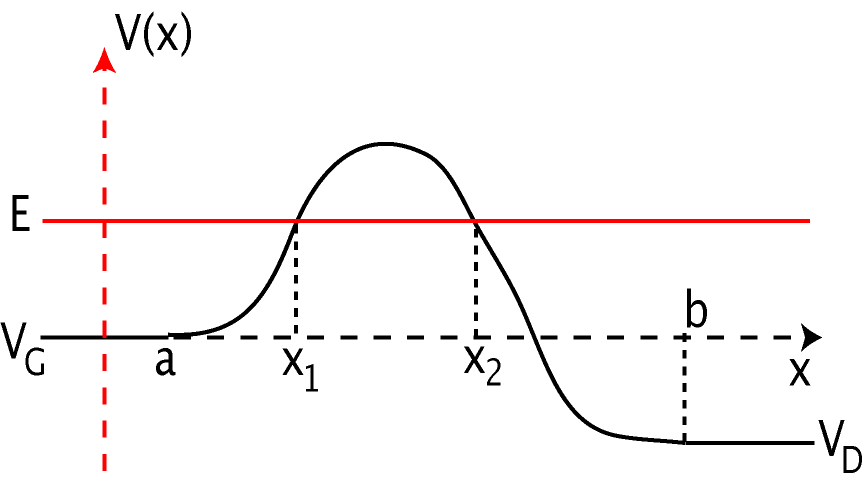 schéma de la barrière de potentiel géométrie pour un état stationnaire montrant une partie tunnel.